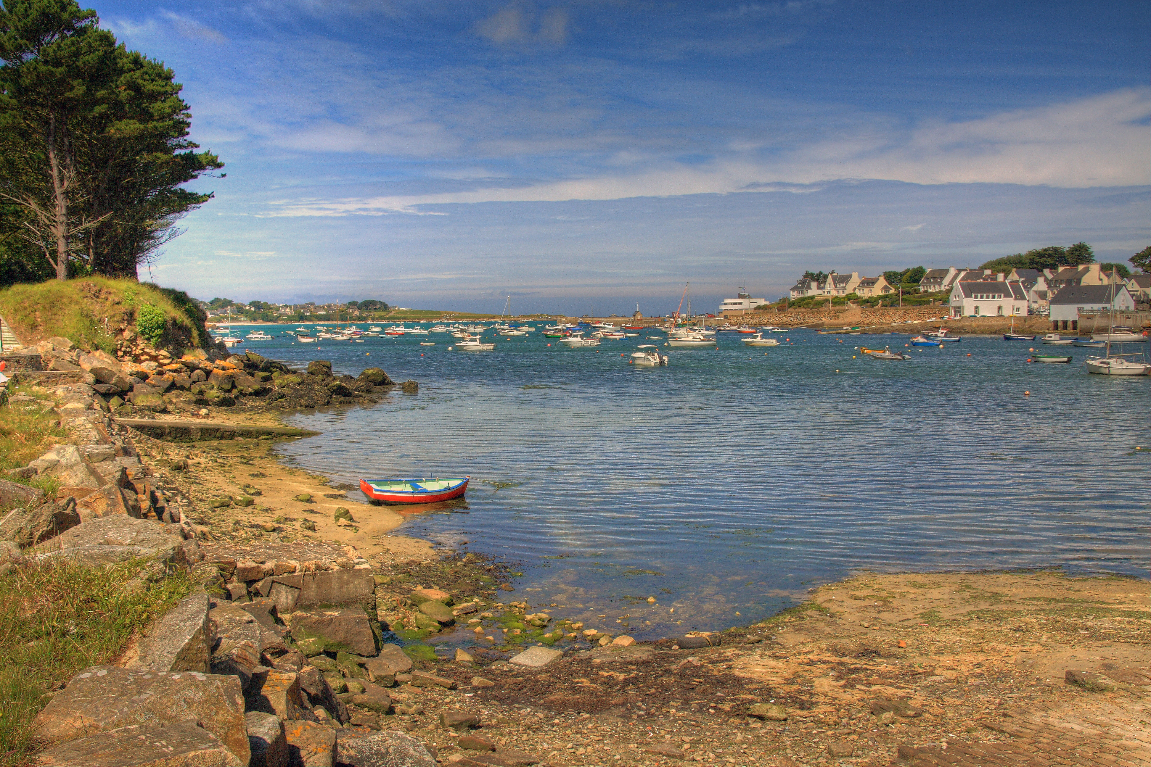 Portsall